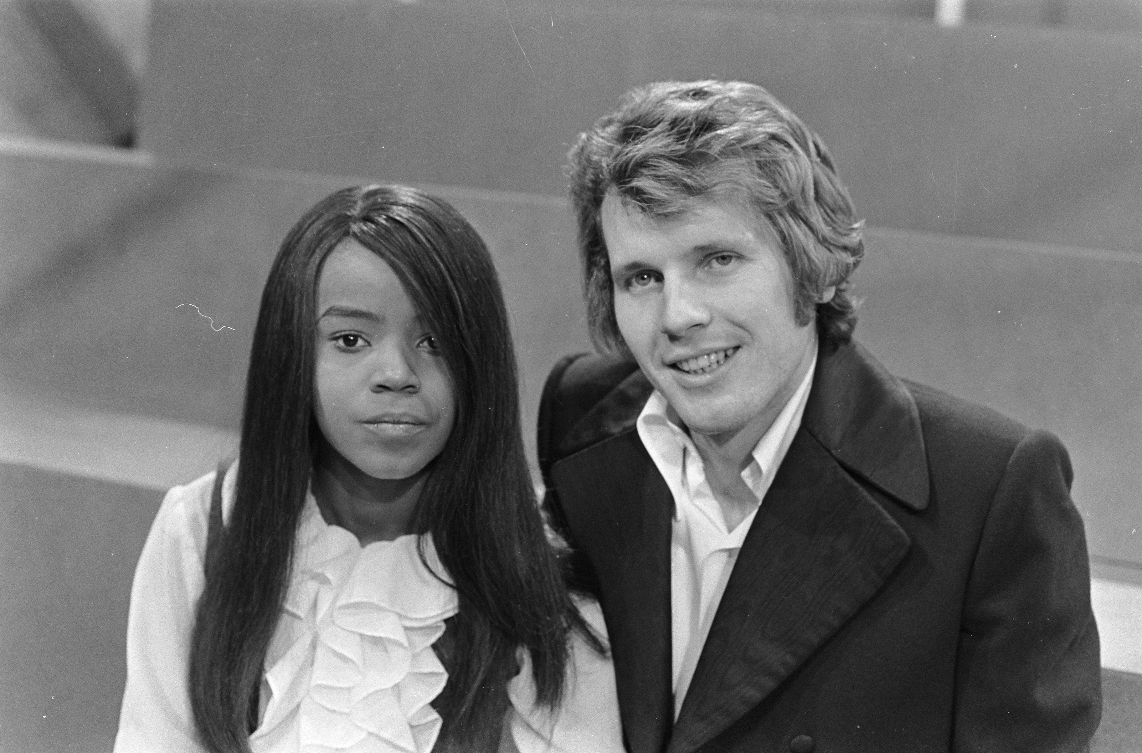 Collectie / Archief : Fotocollectie Anefo Reportage / Serie : [ onbekend ] Beschrijving : Zangeres P.P. Arnold en John Walker zullen optreden in het muziekprogramma Fanclub Datum : 9 november 1967 Persoonsnaam : Arnold, P.P., Walker, John Fotograaf : Kroon, Ron / Anefo Auteursrechthebbende : Nationaal Archief Materiaalsoort : Negatief (zwart/wit) Nummer archiefinventaris : bekijk toegang 2.24.01.05 Bestanddeelnummer : 920-8440 Reacties Geplaatst door Maaike op 22 oktober 2013 - 15:59. VARA televisie programma De zangeres PP Arnold en de zanger John Walker zullen optreden in het muziekprogramma 'Fenklup' welke wordt uitgezonden op 16 november 1967 NB. De titel voor het tienerprogramma / muziekprogramma 'Fanclub' werd - na het vertrek van Judith Bosch - vanaf 28 oktober 1967 gewijzigd in 'Fenklup'. De nieuwe presentatrice werd Yvonne van Zuiden